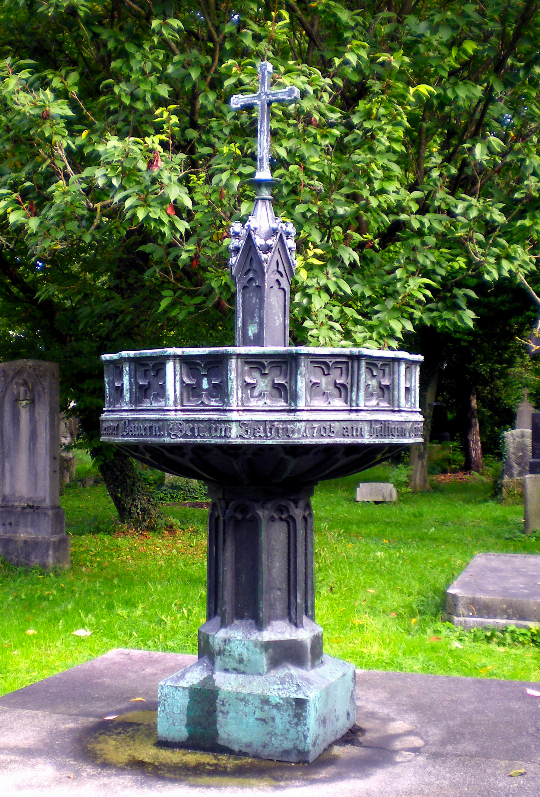 Im Alten Südfriedhof in München steht dieses Denkmal an die Sendlinger Bauernschlacht von 1705.